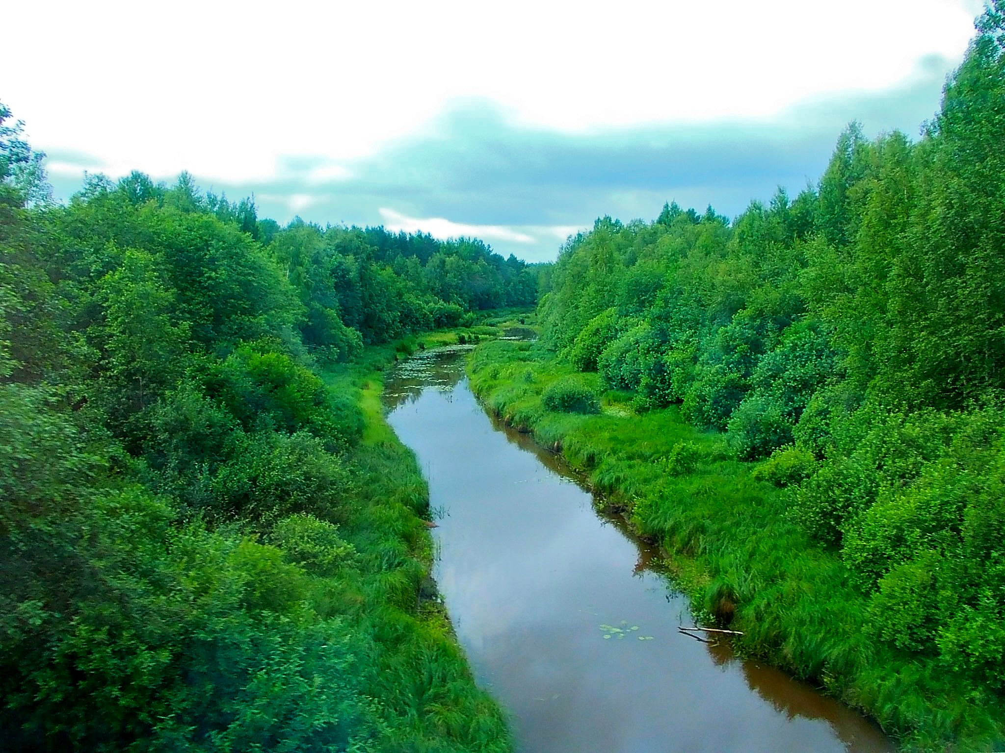 Река Кумбито